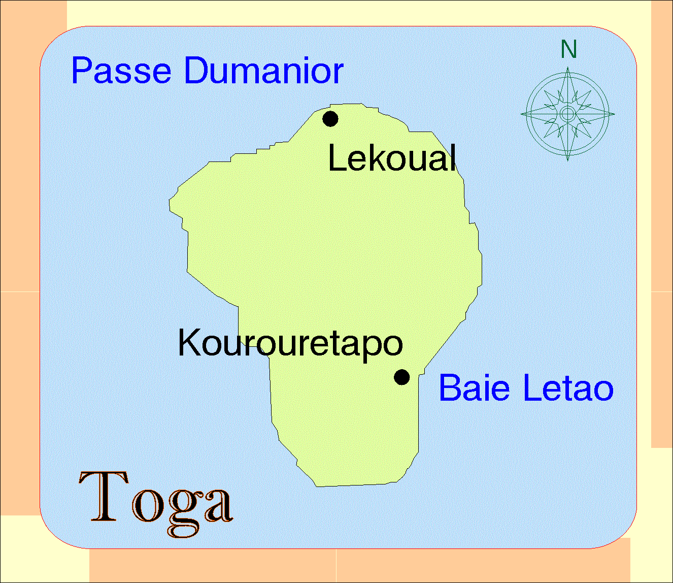 Карта на остров Тога.